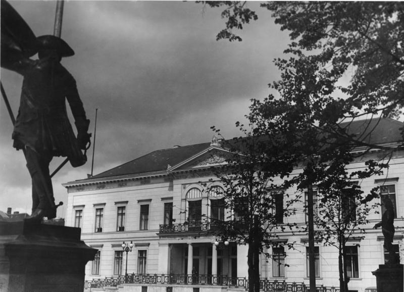 Berlin Blick vom Wilhelmplatz auf das Ministerium für Volksaufklärung und Propaganda Juli 1936